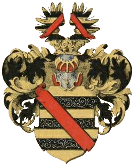 Broel gen. Plateri suguvõsa aadlivapp